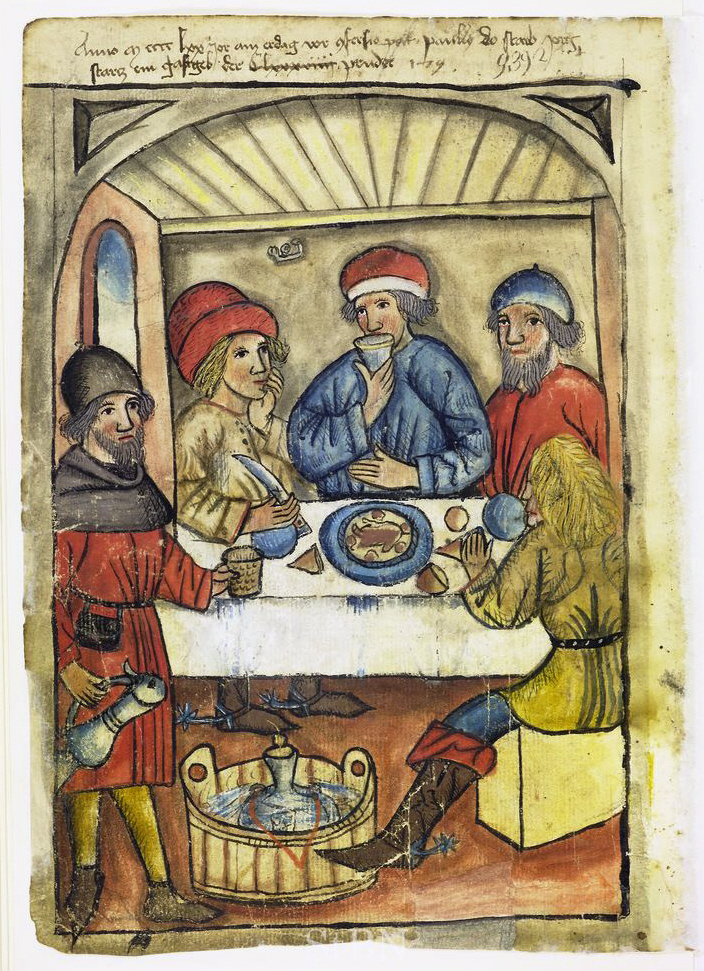 jorg (Jörg; georg) starcz (Startz) , gastgeb (Gastgeber; Wirt) Transkription und weitere Informationen